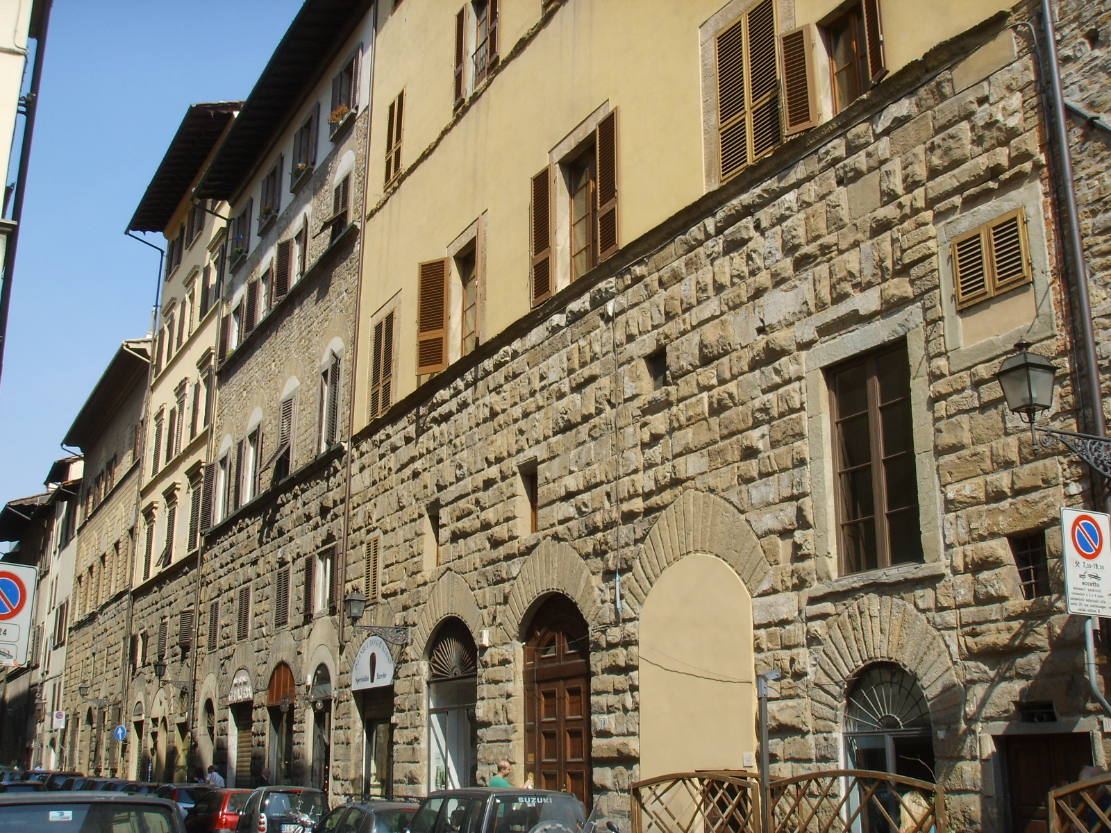 Via_de'_benci in Florence